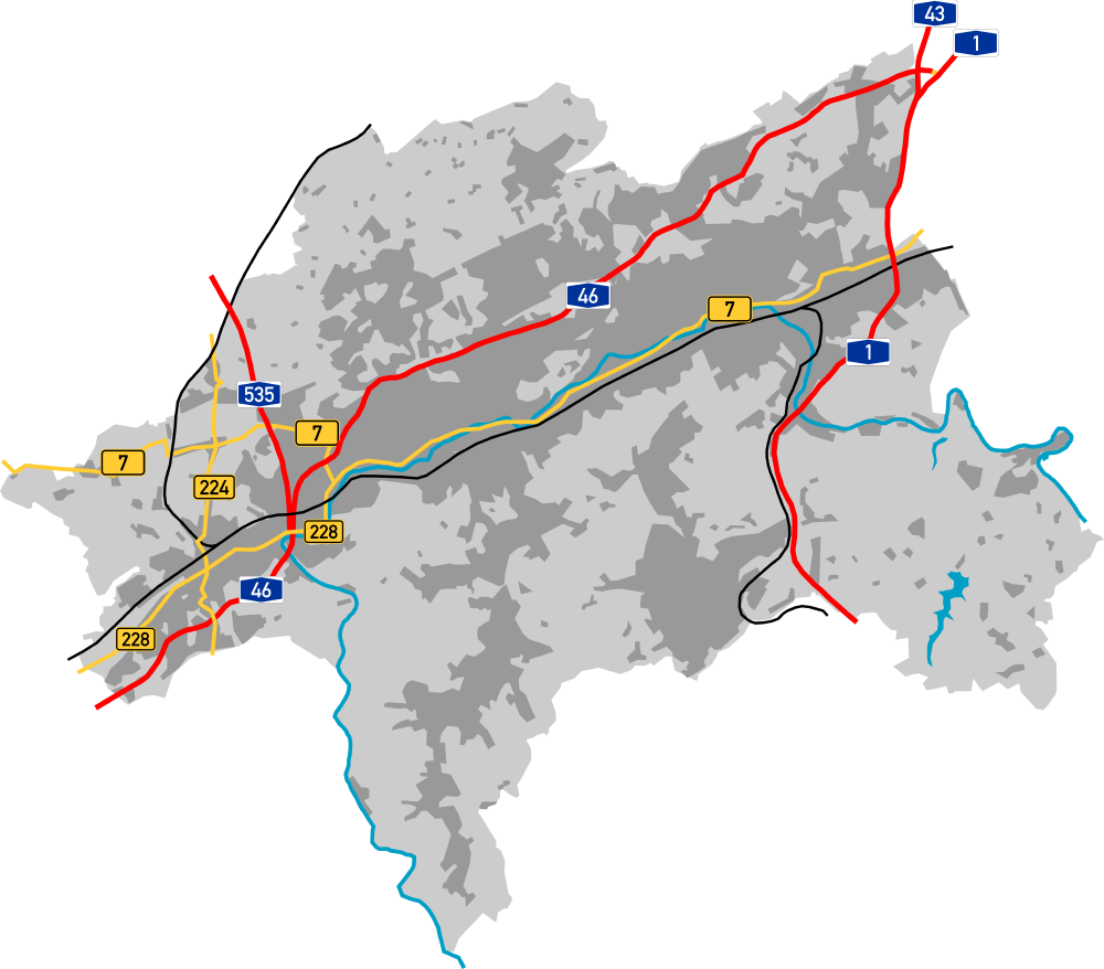 Schematische Darstellung der Autobahnen, Bundesstraßen und Bahnlinien in Wuppertal